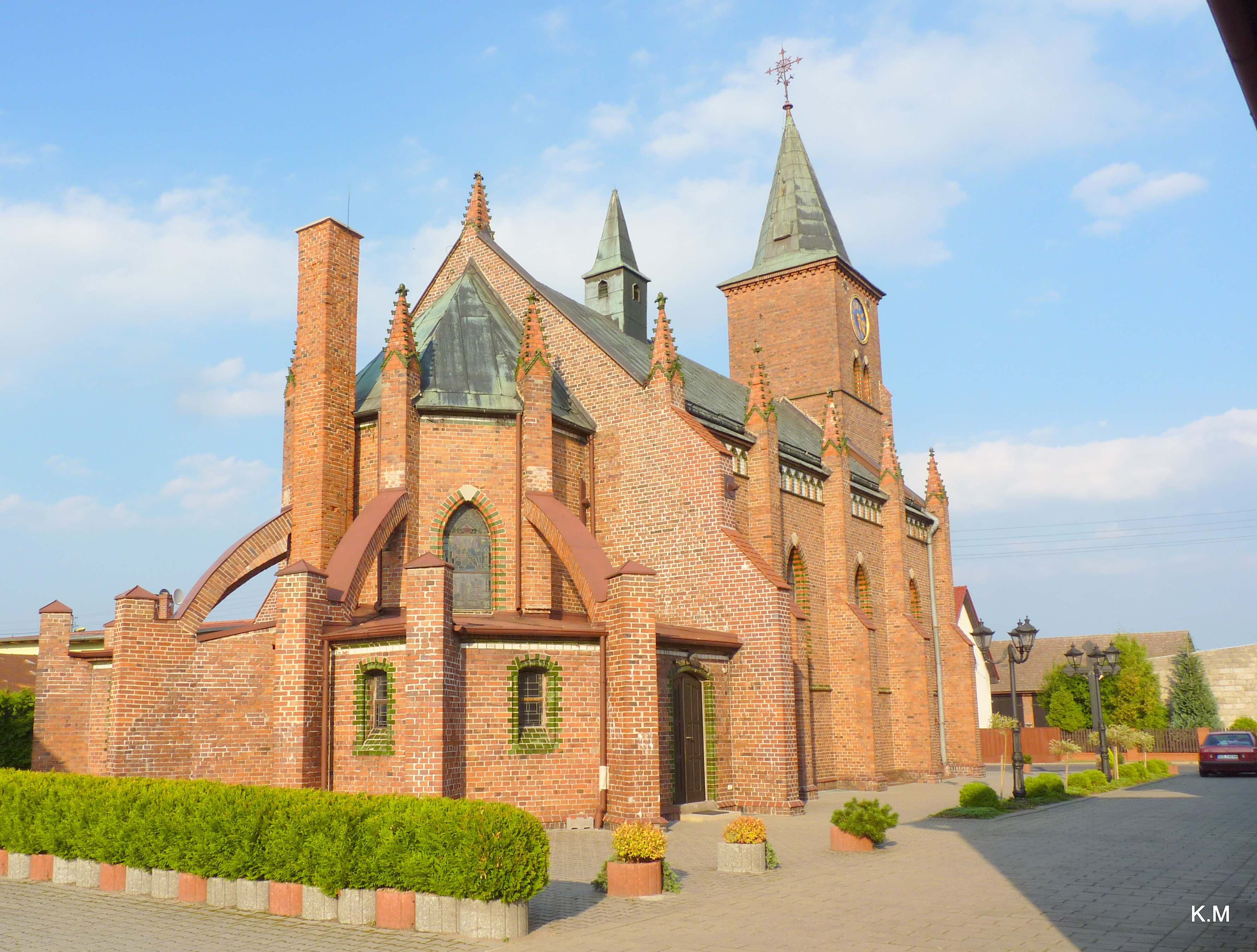 Sieraków Śląski - kościół p.w św . Jana Nepomucena.